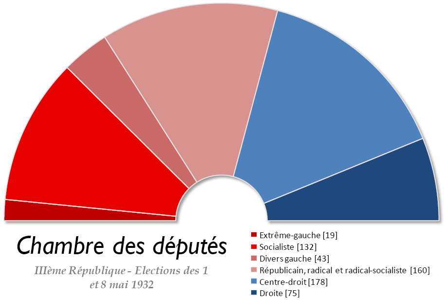 Chambre des députés française issue des élections législatives de 1932